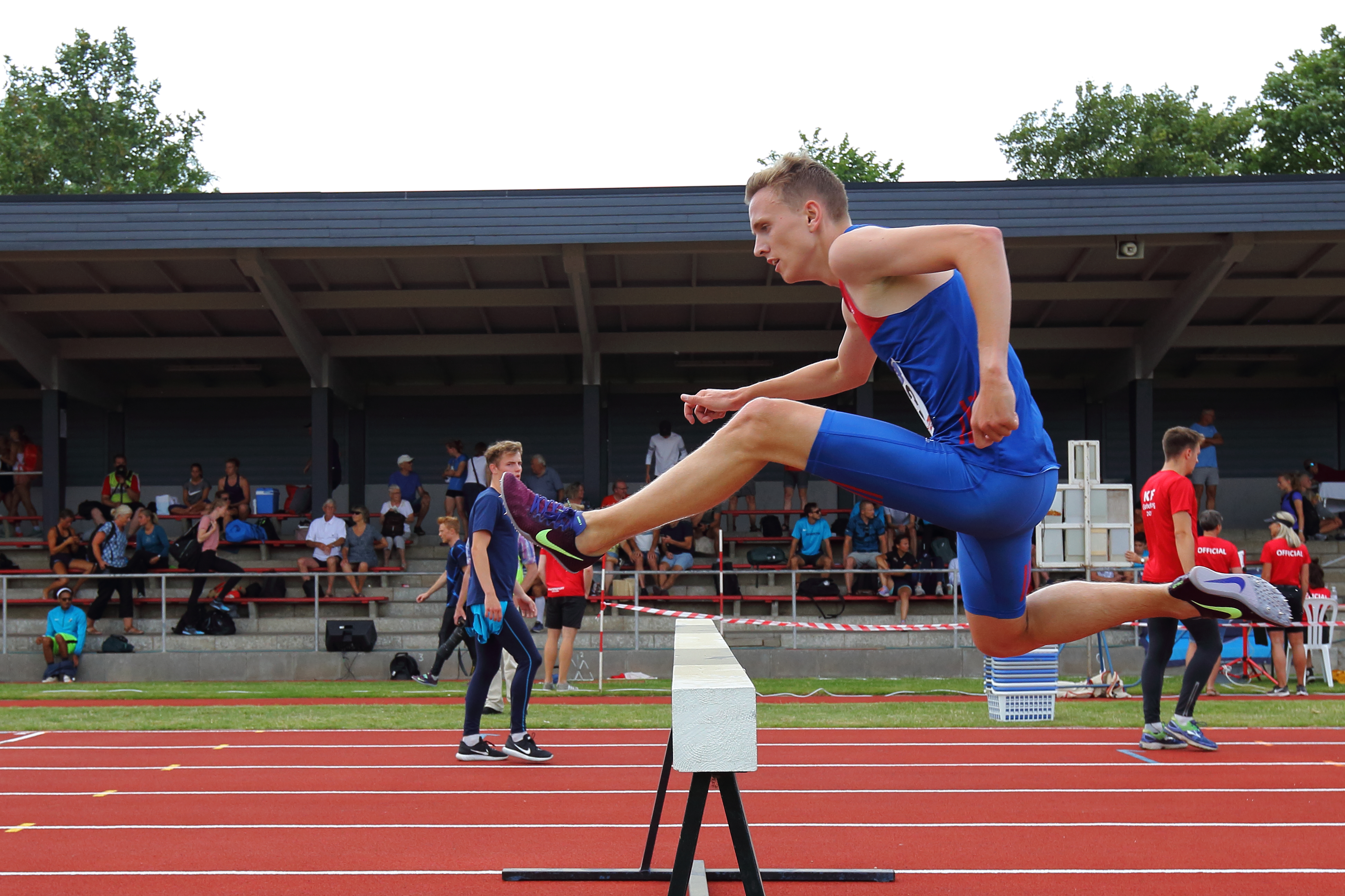 Jakob Dybdal Abrahamsen DM 3000m forhindrinsløb